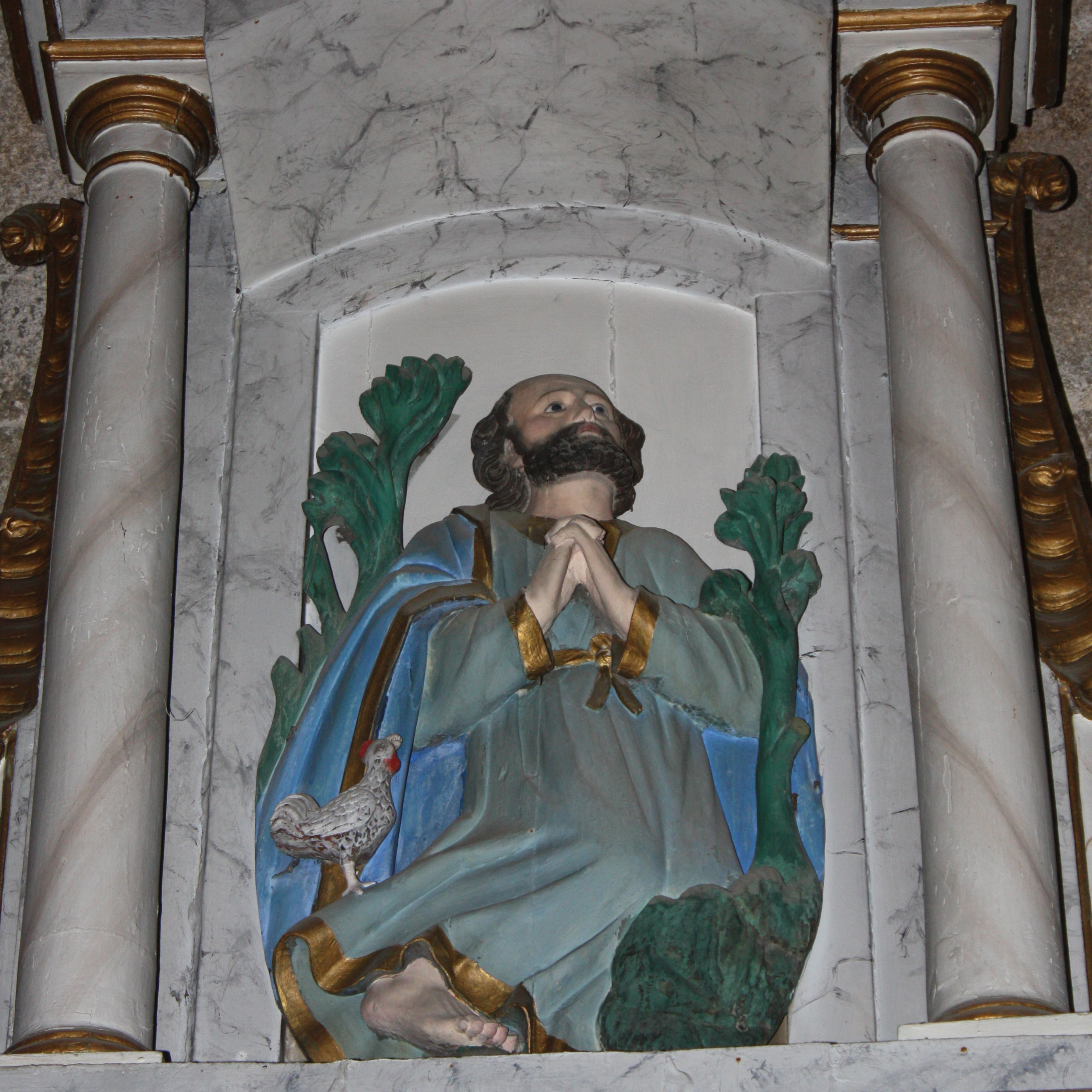 San Pedro, no retablo da capela do Hospital (Cambados, Pontevedra). O galo ós pés lembra a cita bíblica: "Hoxe, esta mesma noite, antes que cante o galo por segunda vez, ti negarasme tres veces".